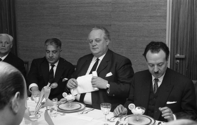 BM Schmücker empfängt Industrieminister Dr. Abdul Karim Kanouna (Irak), Gen. Dir. Mutrali und Lg.Rat Zinn (rechts im Bild der irakische Botschafter)